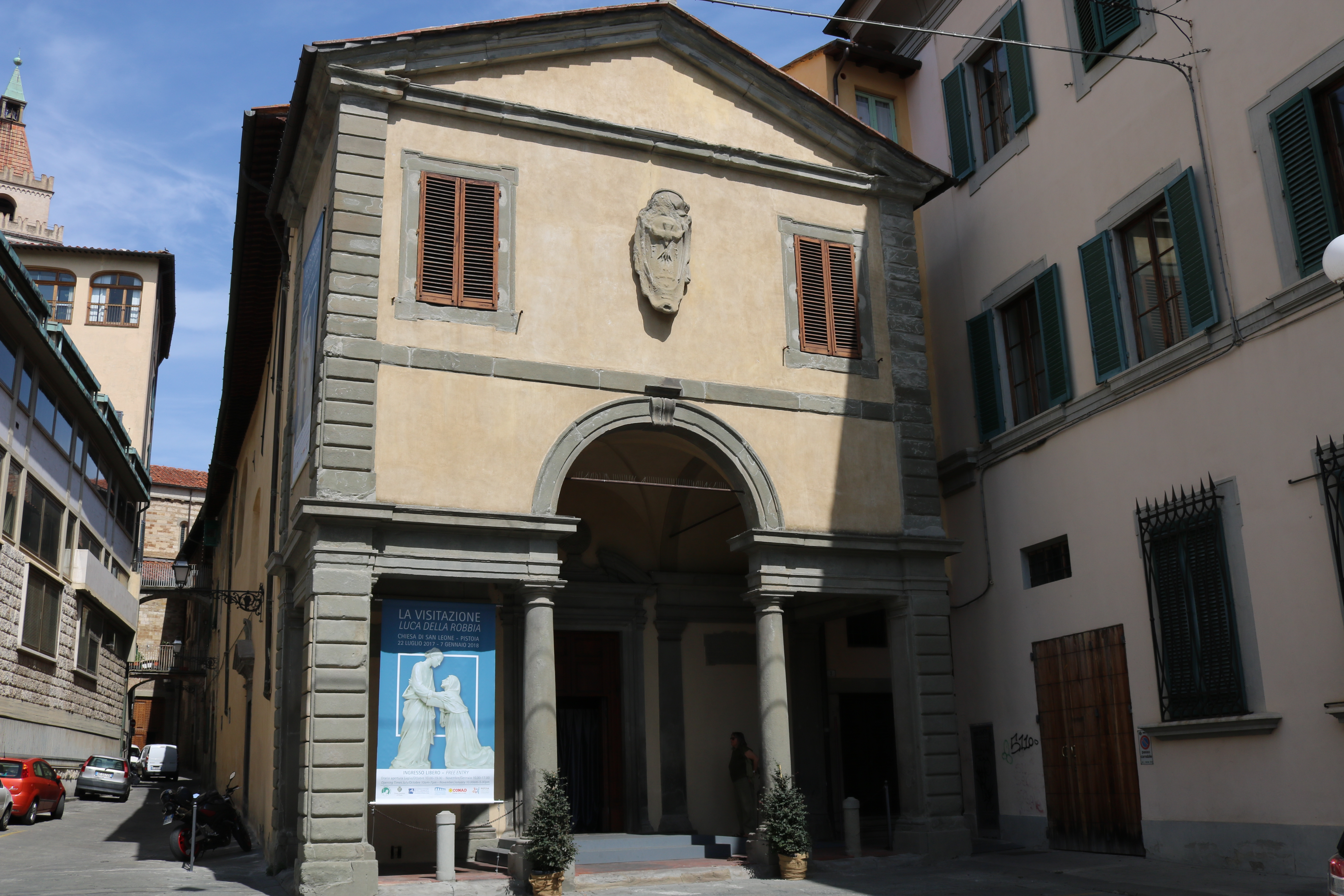 Chiesa di San Leone, Pistoia